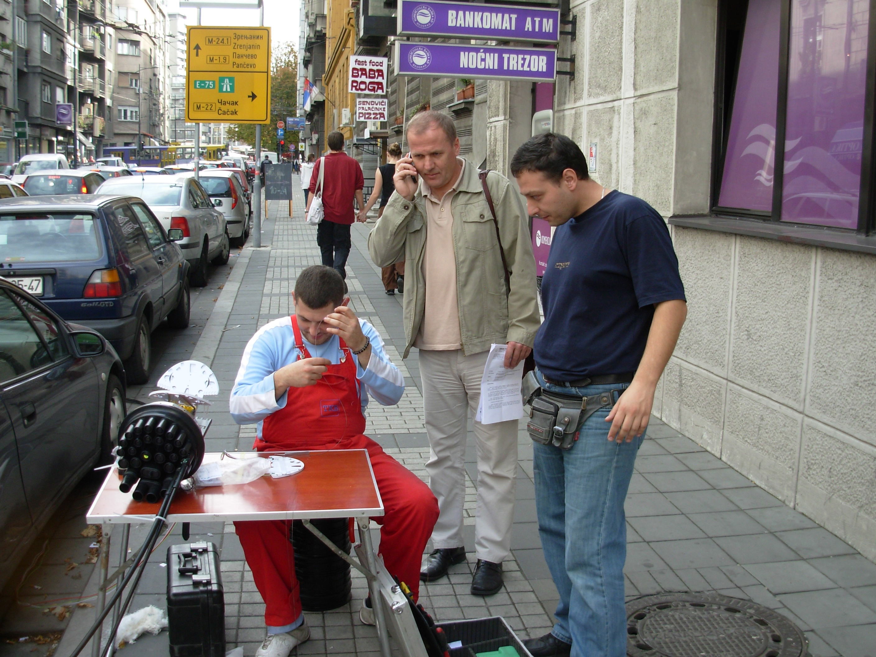 Спајање оптичког кабла, Београд, Србија. Сликао Голдфингер